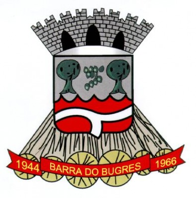 Brasão do município brasileiro de Barra do Bugres